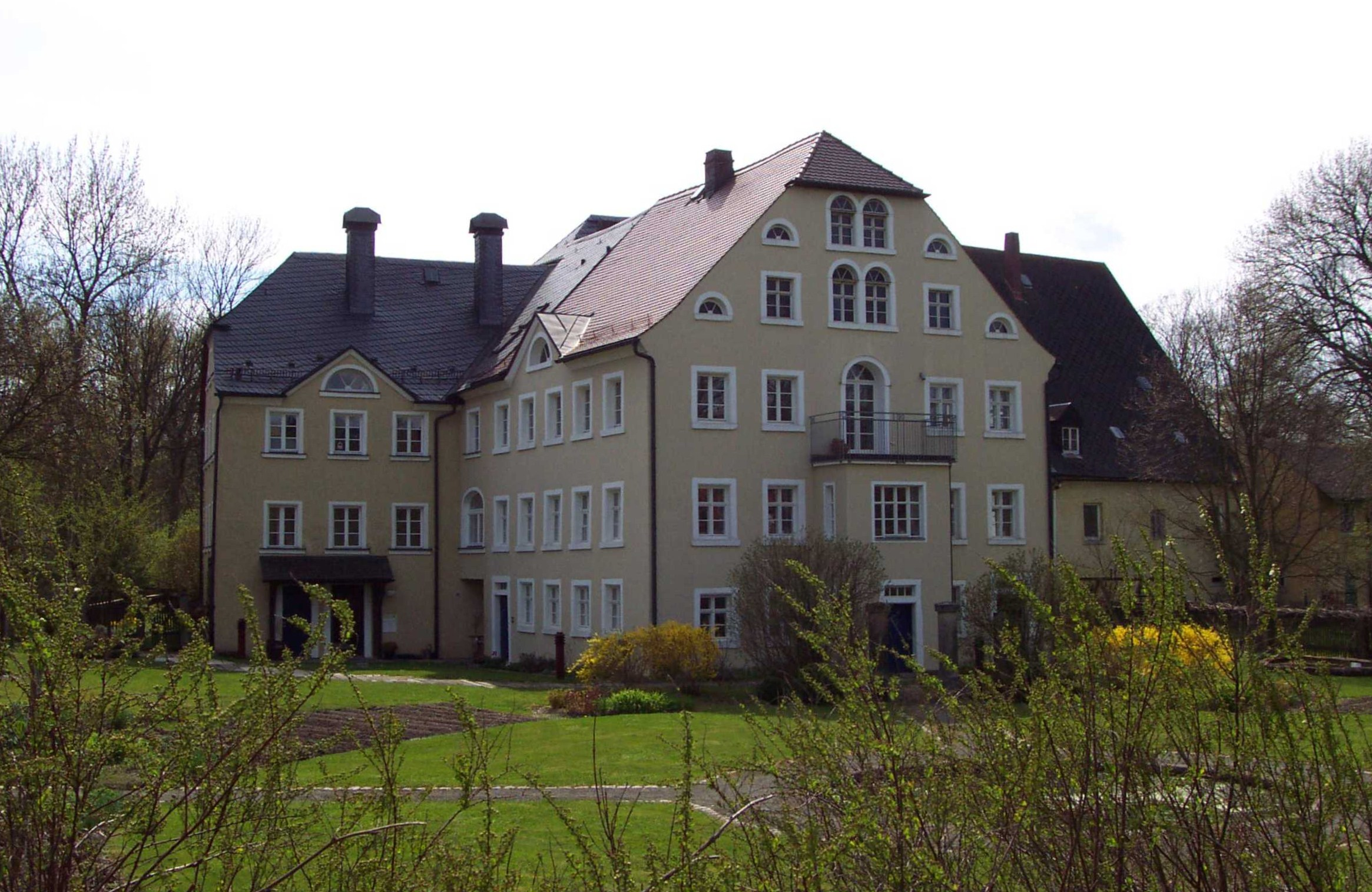 Das Hammergut Kaiserhammer im Jahr 2004.